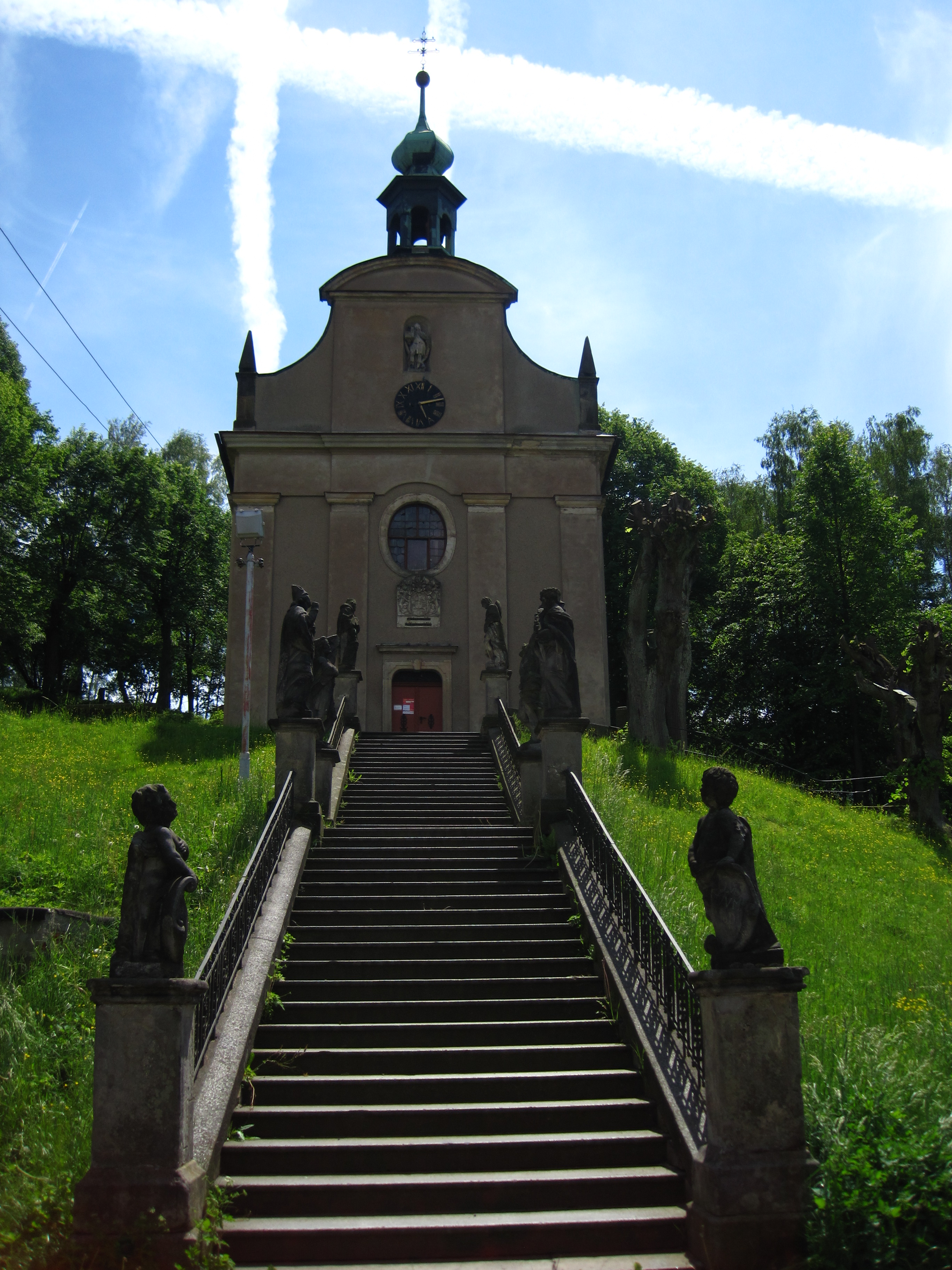 Kostel Zvěstování Panny Marie, Vilémov (okres Děčín).